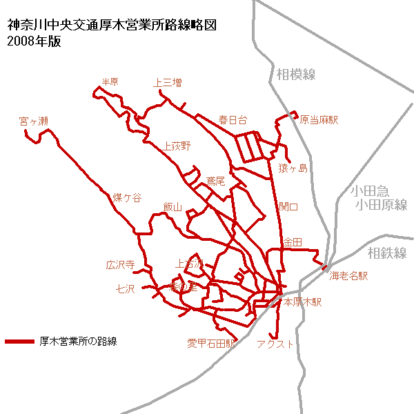 神奈川中央交通厚木営業所路線略図（2008年） 赤線:バス路線 灰線:鉄道線